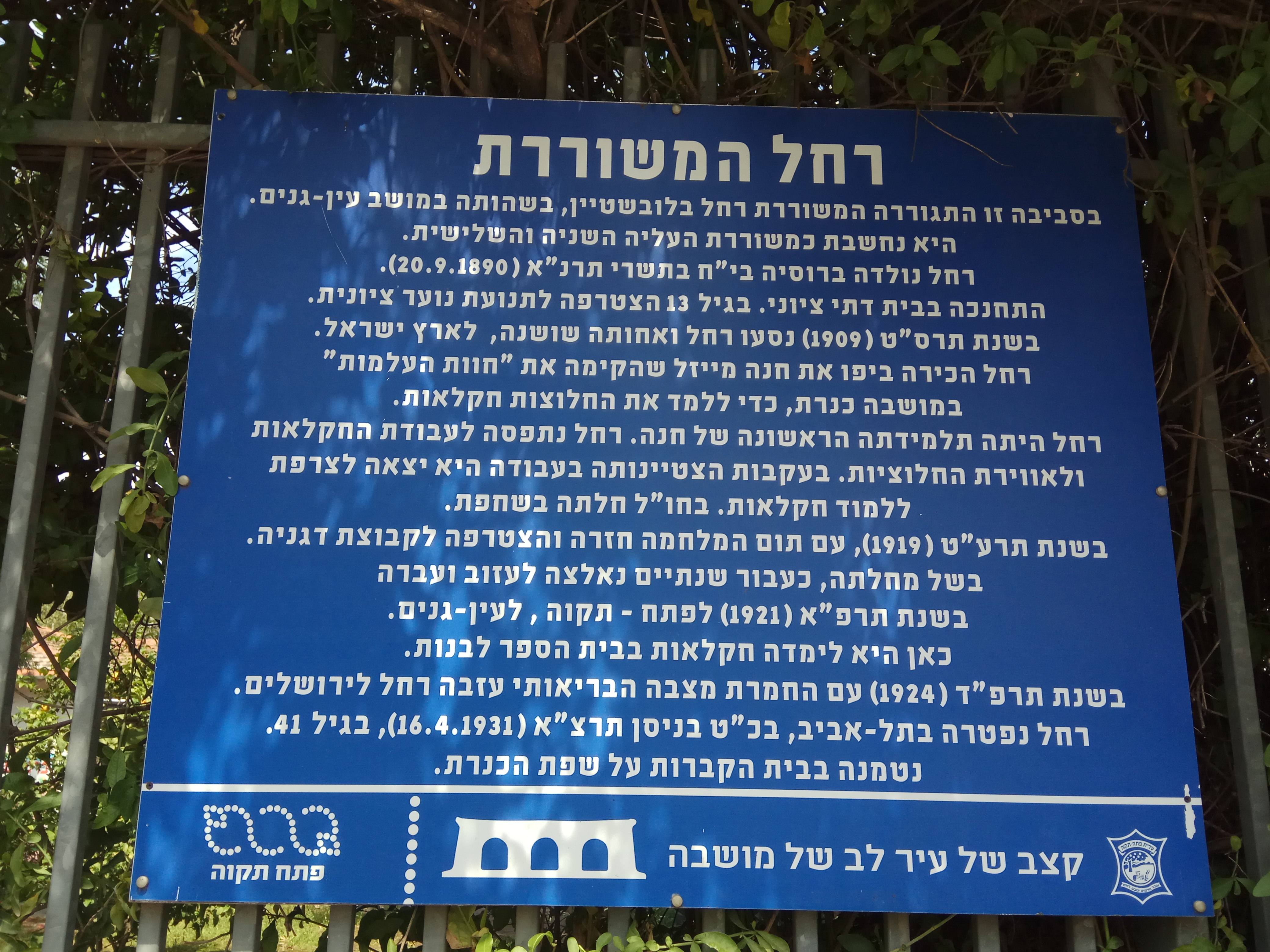 שלט על רחל המשוררת ברחוב אחד העם פינת רחל המשוררת בפתח תקוה